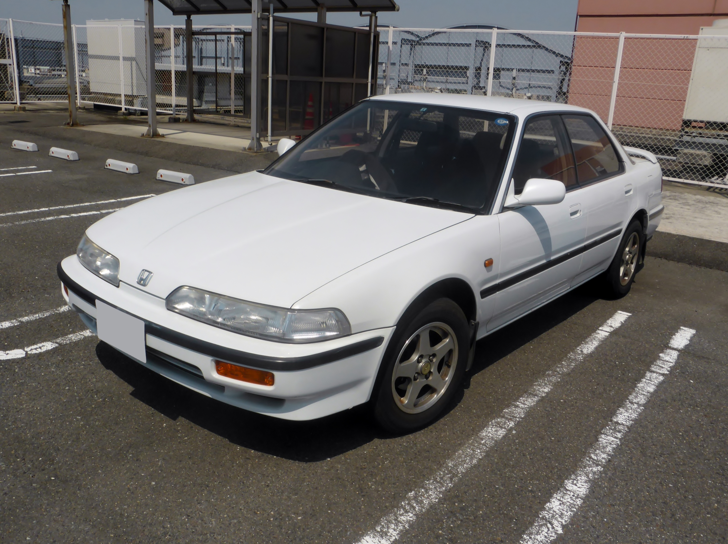 E-DA7型ホンダ・インテグラZXエクストラをフロントから撮影。